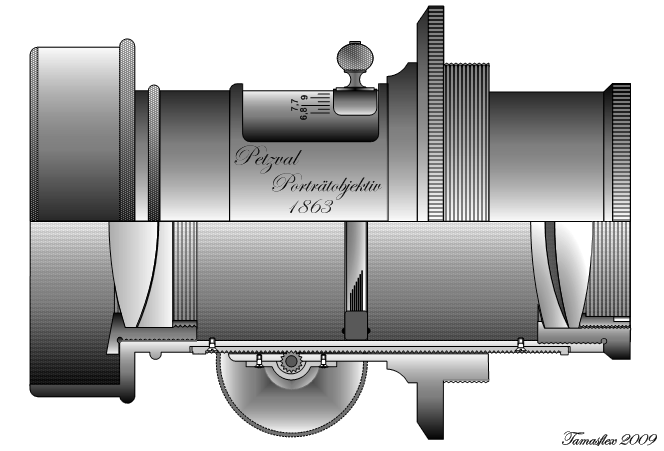 Petzval Portrait Lens.